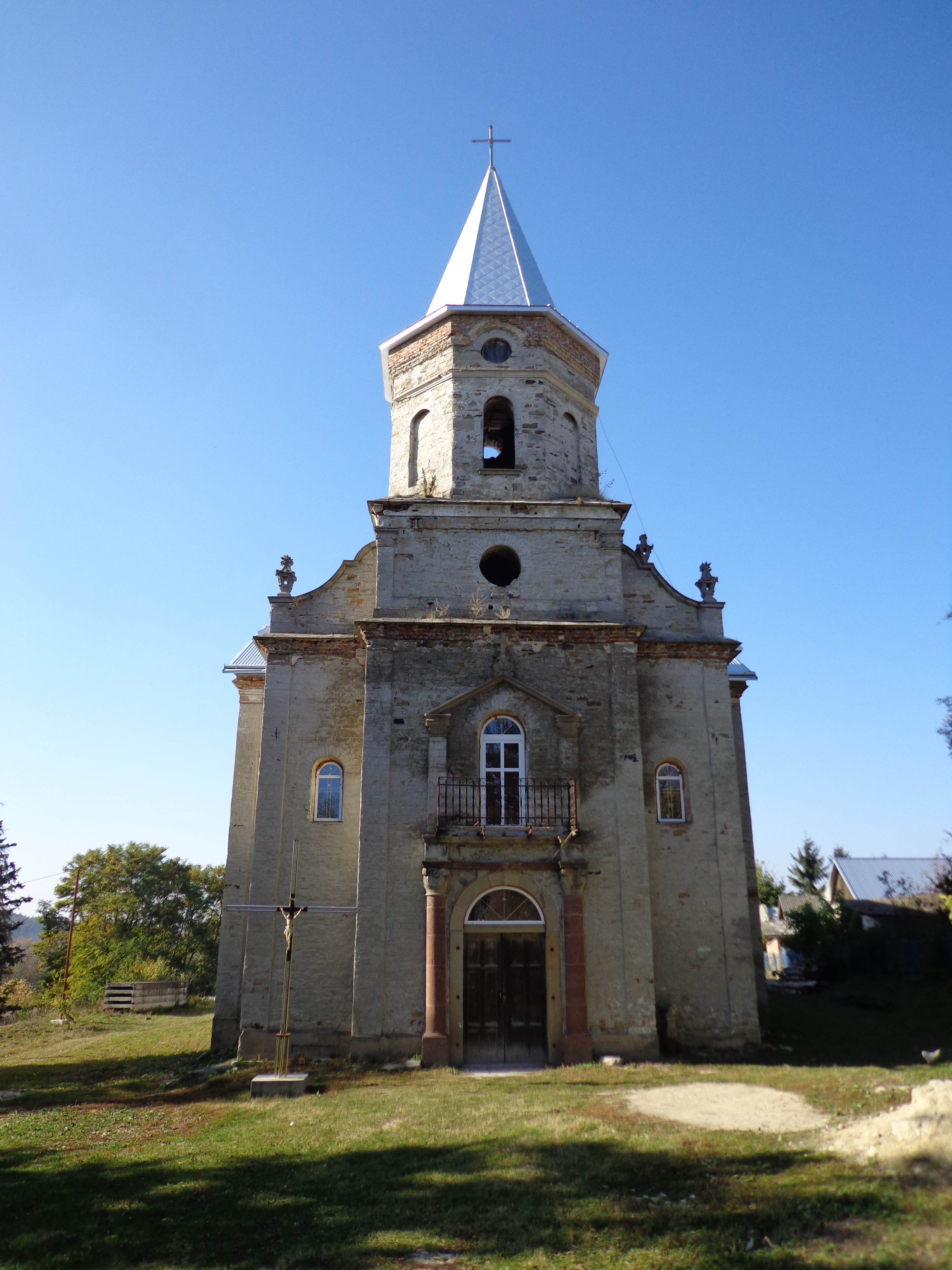 Костел святого Вацлава (мур.), село Баворів